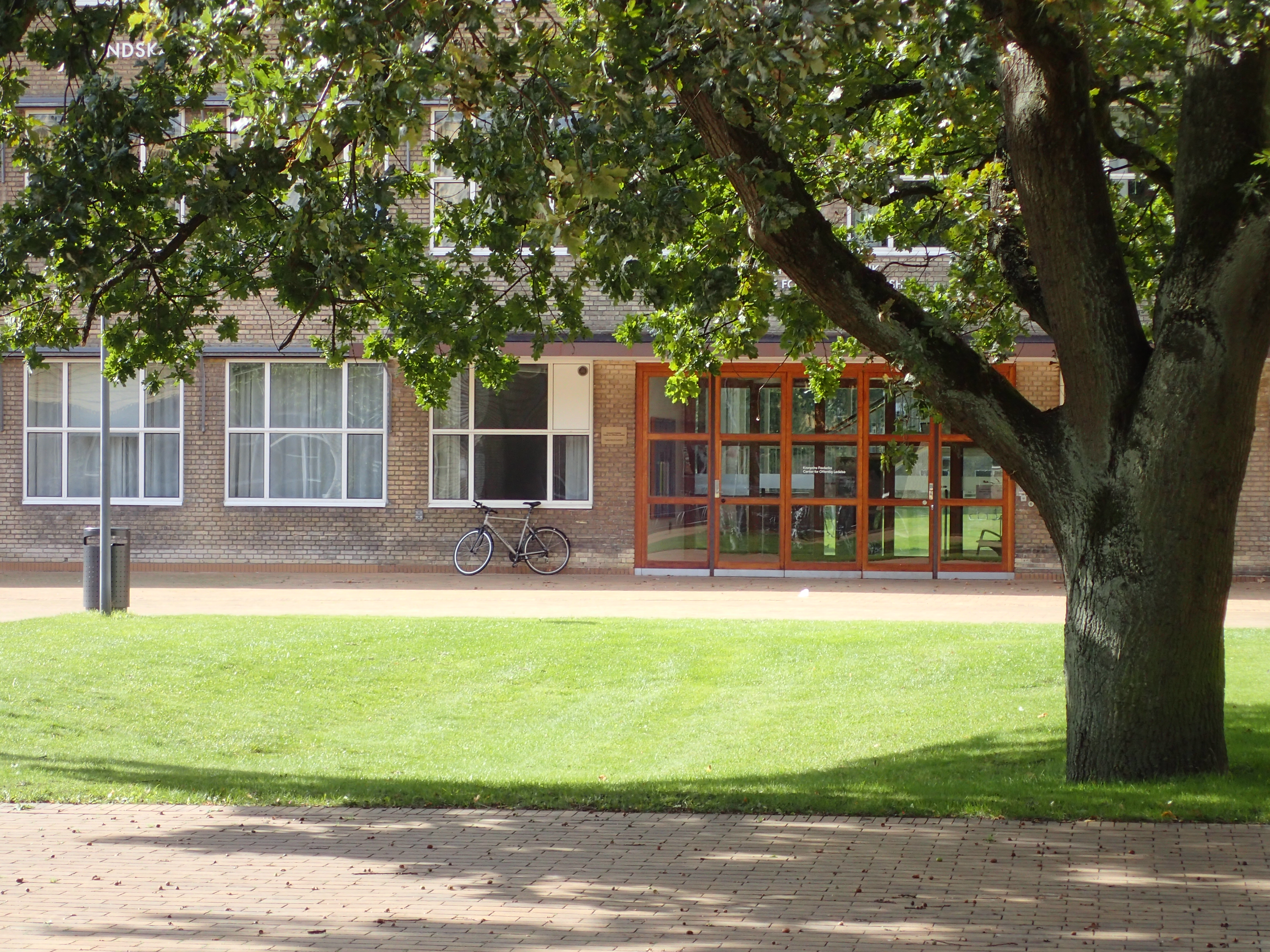 Kronprins Frederiks Center for Offentlig Ledelse, Aarhus Universitet. Centret åbnede 23. maj 2018 i Institut for Statskundskabs bygninger.Bygningen blev opført i 1933 som den først ved universitetet.